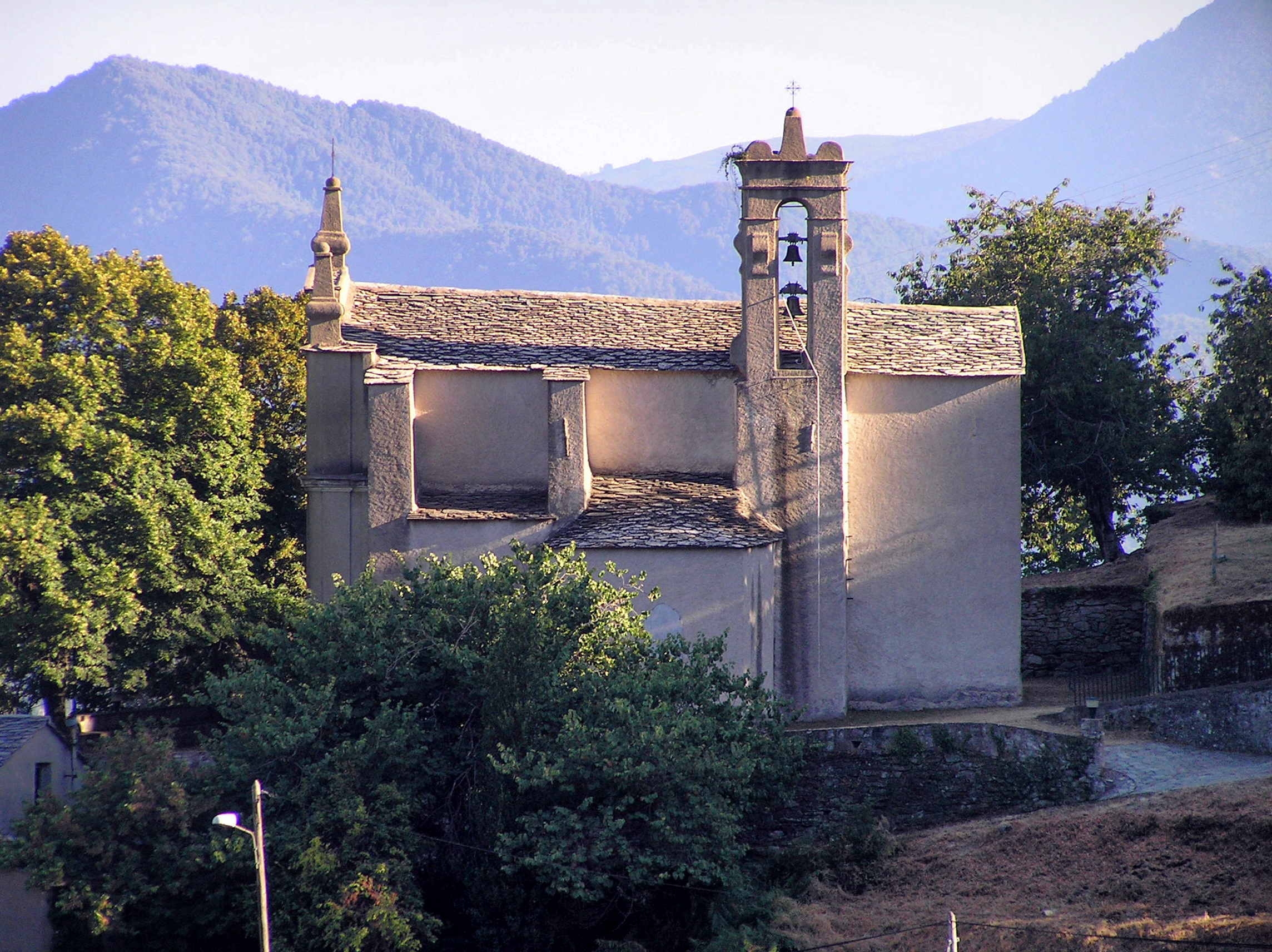 Piano, Castagniccia (Haute-Corse) - L'église paroissiale Saint-Roch du XVIIe siècle.